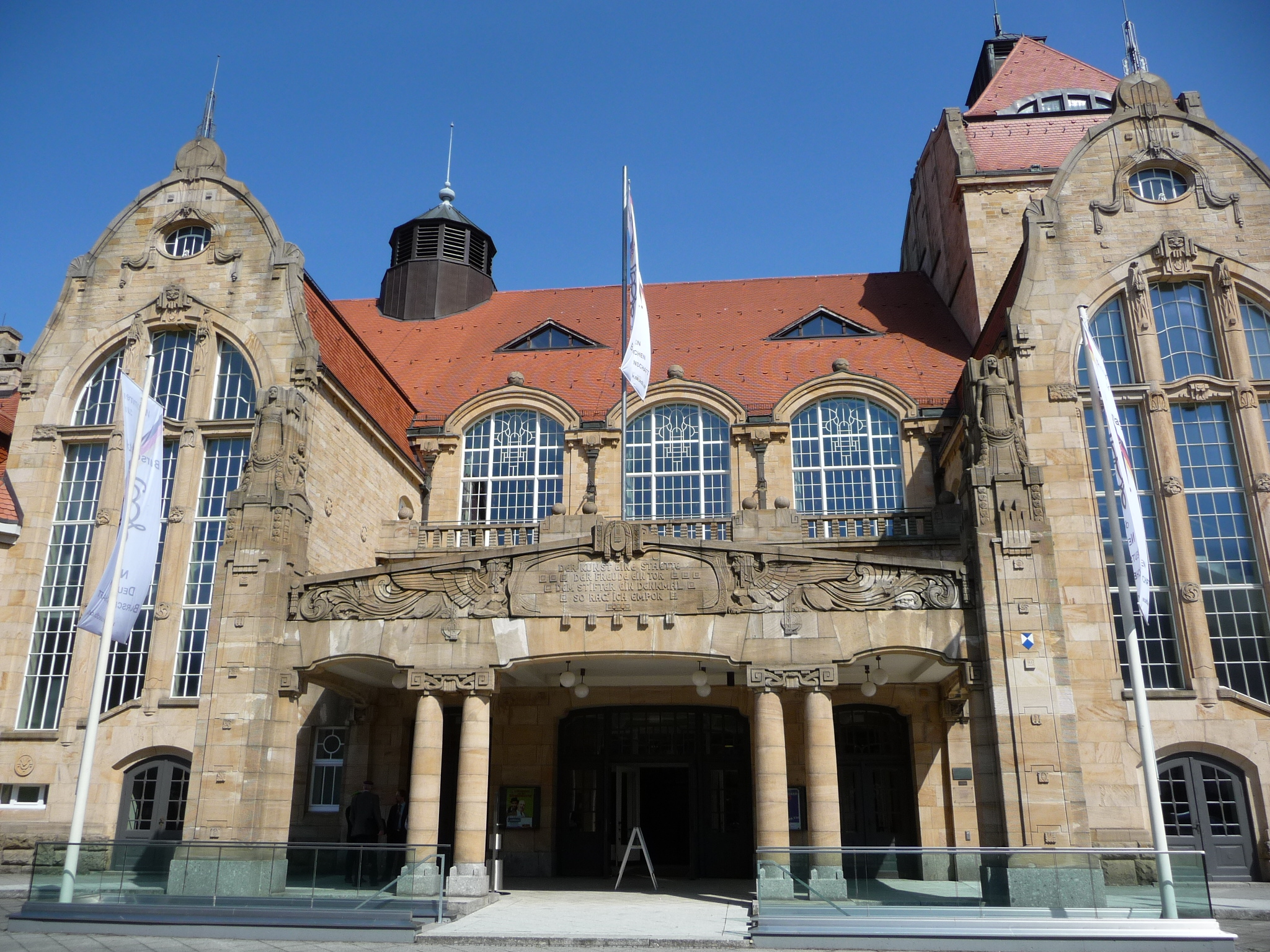 Die Jugendstil-Festhalle (Ludowici-Festhalle) ist die Mehrzweckhalle der Stadt Landau in der Pfalz und zählt zu den bedeutendsten Jugendstilbauten Süddeutschlands.